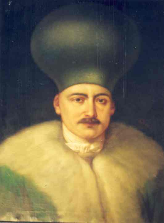 Gheorghe Tattarescu - Portretul Vornicului Şerban Grădişteanu, Muzeul Municipiului Bucureşti, 64x50 cm.